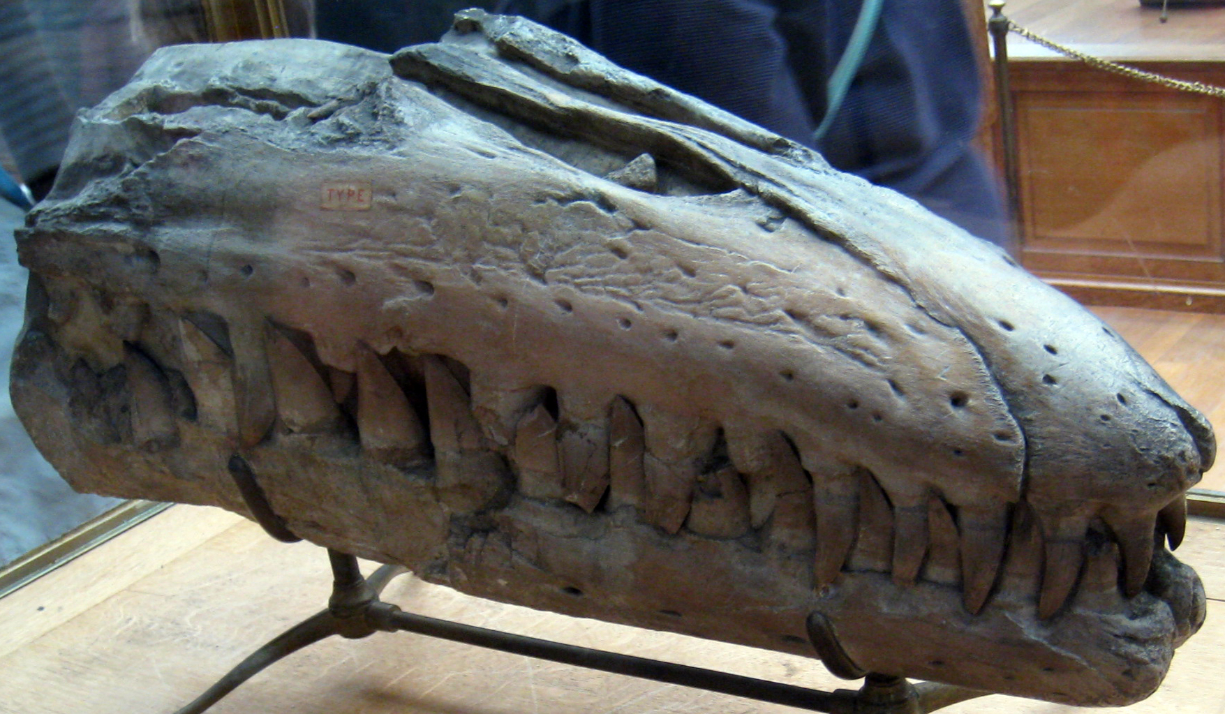 Liodon mosasauroides jaw fragment, Muséum national d'histoire naturelle, Paris.